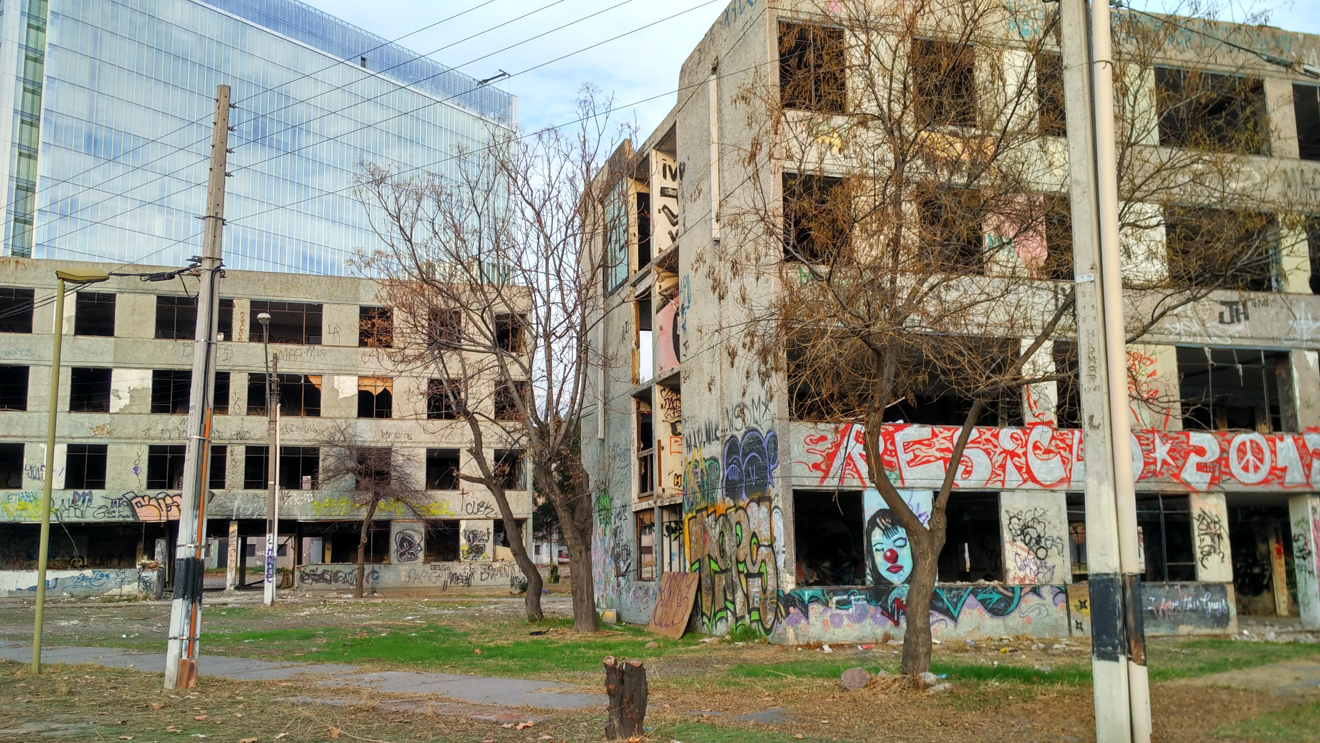 Fotografía de la villa San Luis